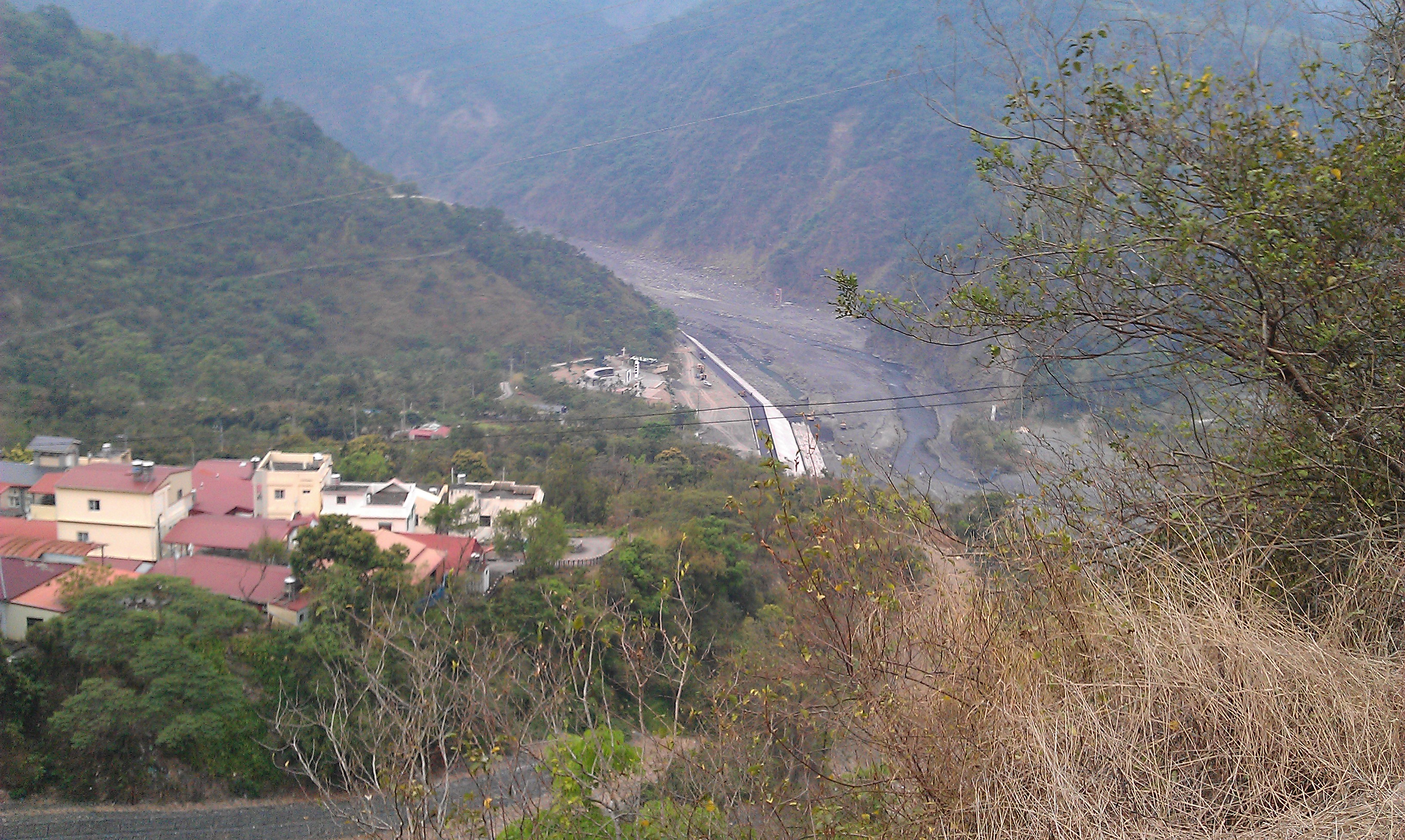 萬山村